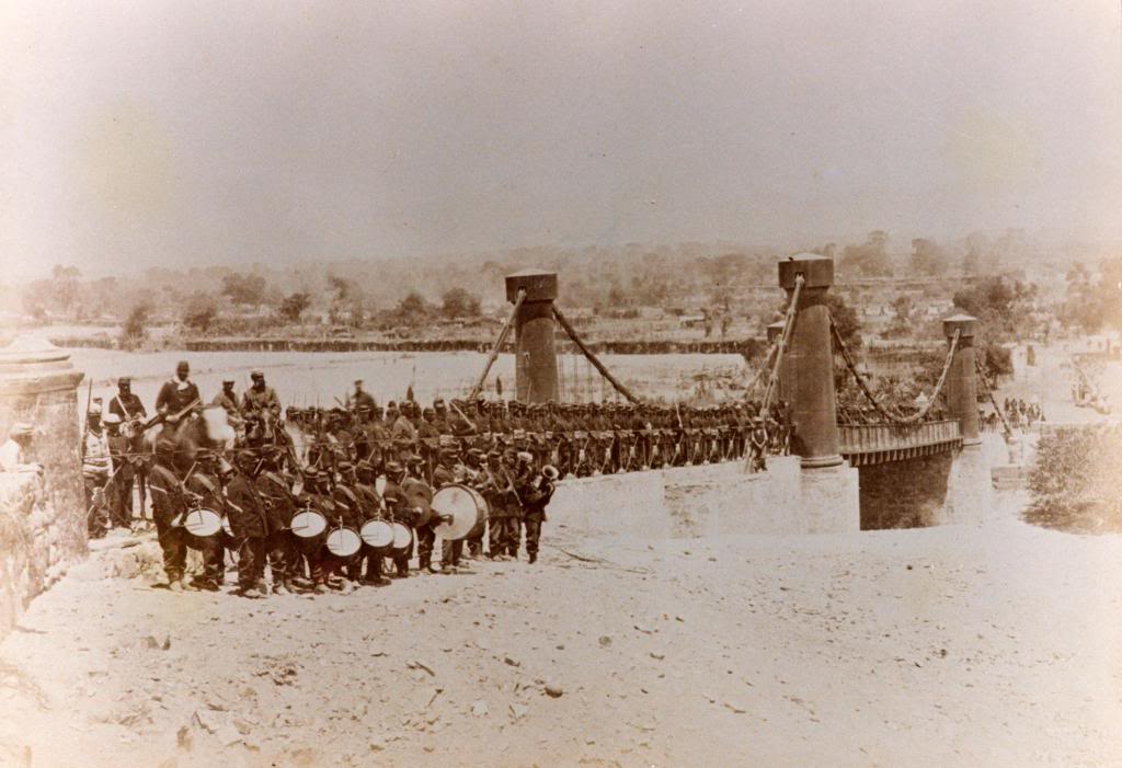 Regimiento Colchagua a la salida de Lurin